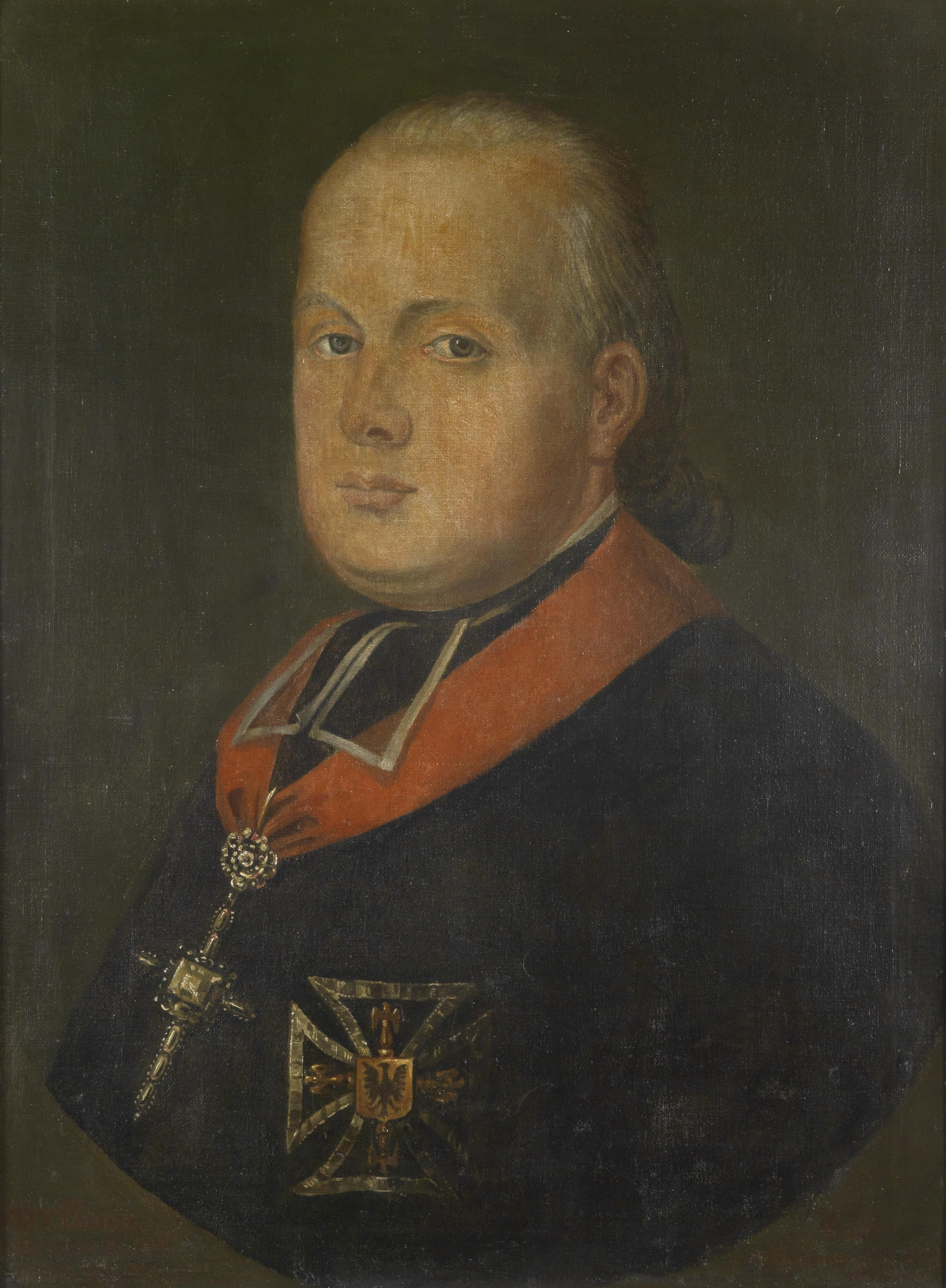 Erzherzog Maximilian Franz von Österreich, Porträt als Kurfürst-Erzbischof von Köln und Hoch- und Deutschmeister